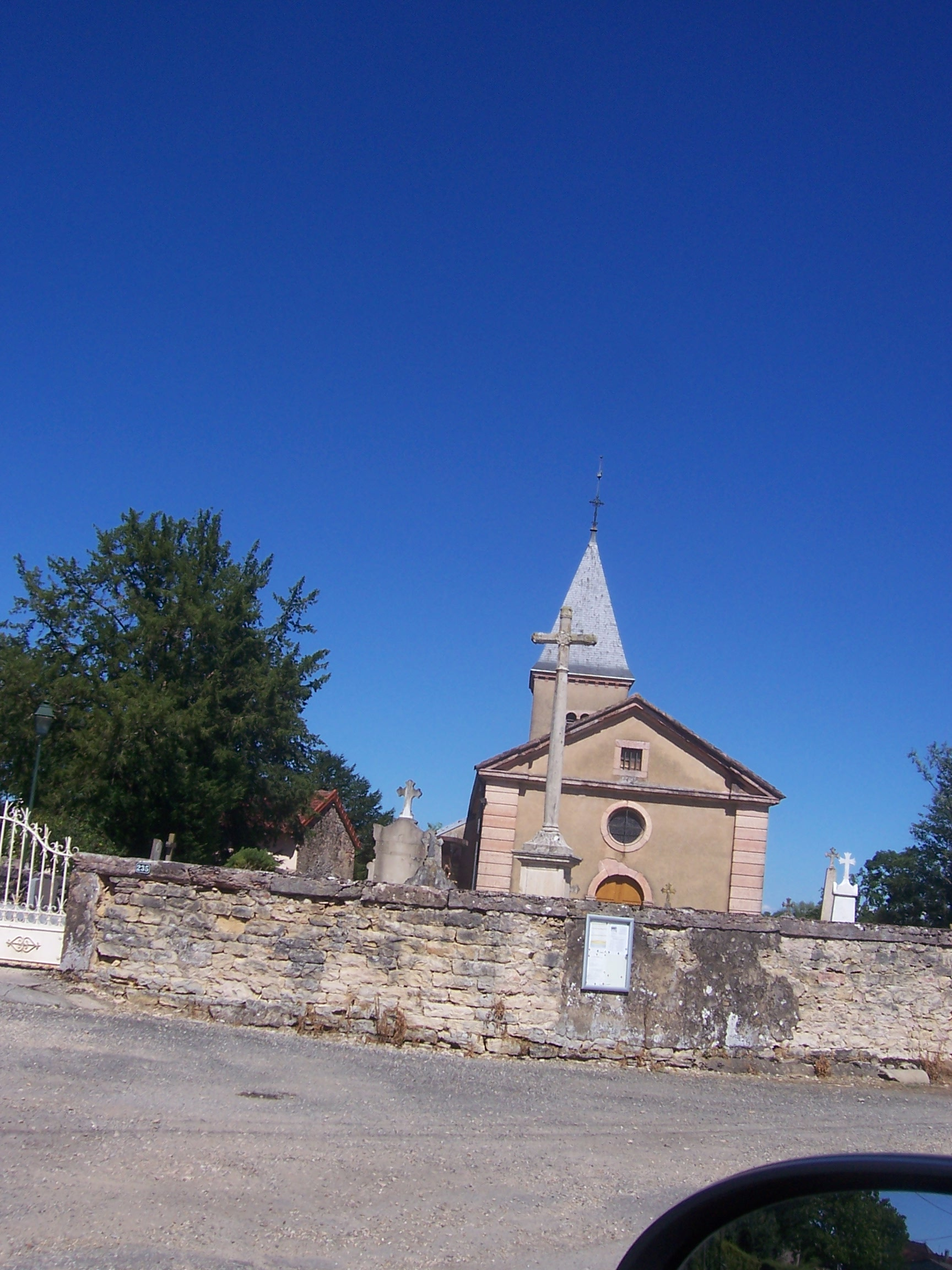 Eglise de Ratenelle